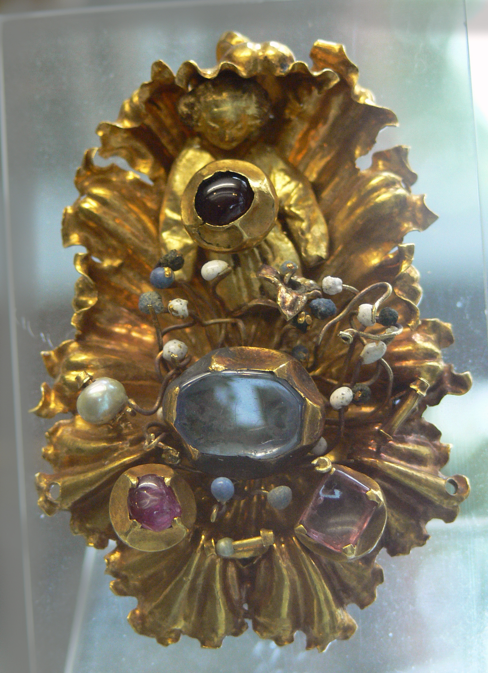 Fürspan mit Engel; Gold, Email en ronde bosse, Edelsteine, Perlen; Burgund um 1420 Kunstgewerbemuseum Berlin, Inv. Nr. F 3515